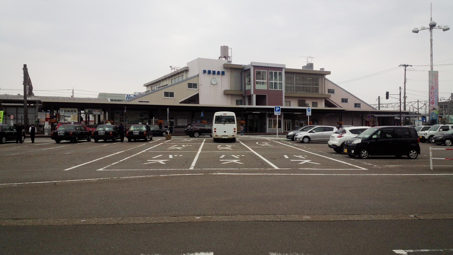 芦原温泉駅駅舎